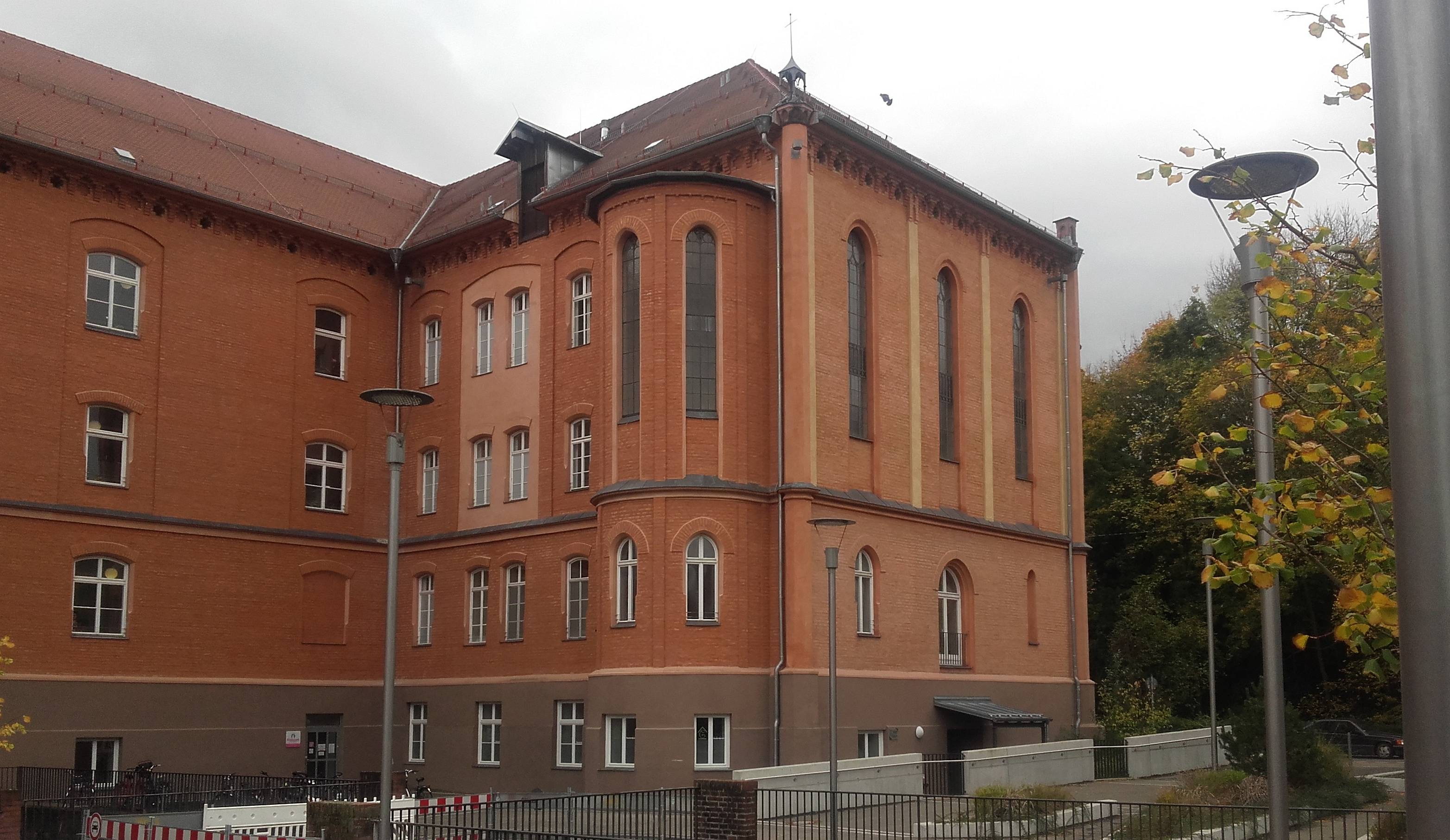 Blick auf die ehemalige protestantische Kapelle im Westflügel des Alten Hauptkrankenhauses in Augsburg